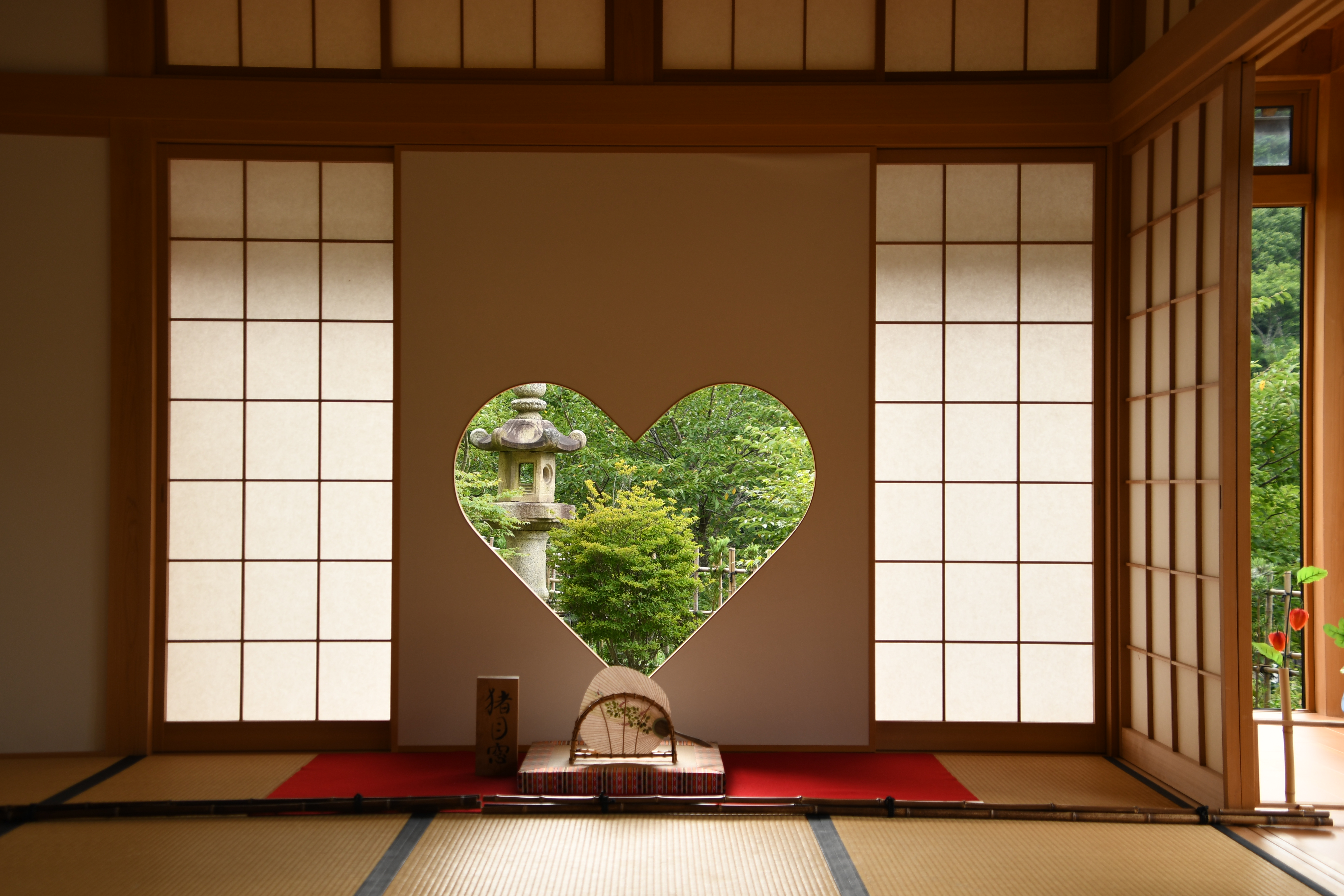 京都府宇治田原町奥山田 正寿院 客殿（則天の間） 猪目窓。2018年8月11日撮影。